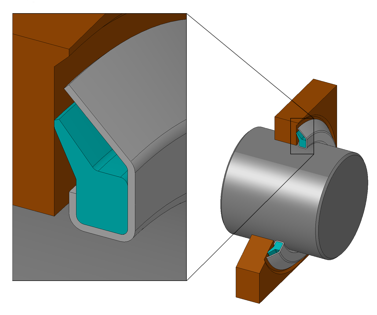 eingebauter Gammaring vom Typ RB im Schnitt mit Detail. Zu sehen ist eine Achse/Welle (dunkelgrau), eine Gehaeusewand (braun) und der Gammaring (hellgrau/tuerkis). Das Blechgehaeuse (grau) und die Dichtung (tuerkis) bilden eine Baueinheit.